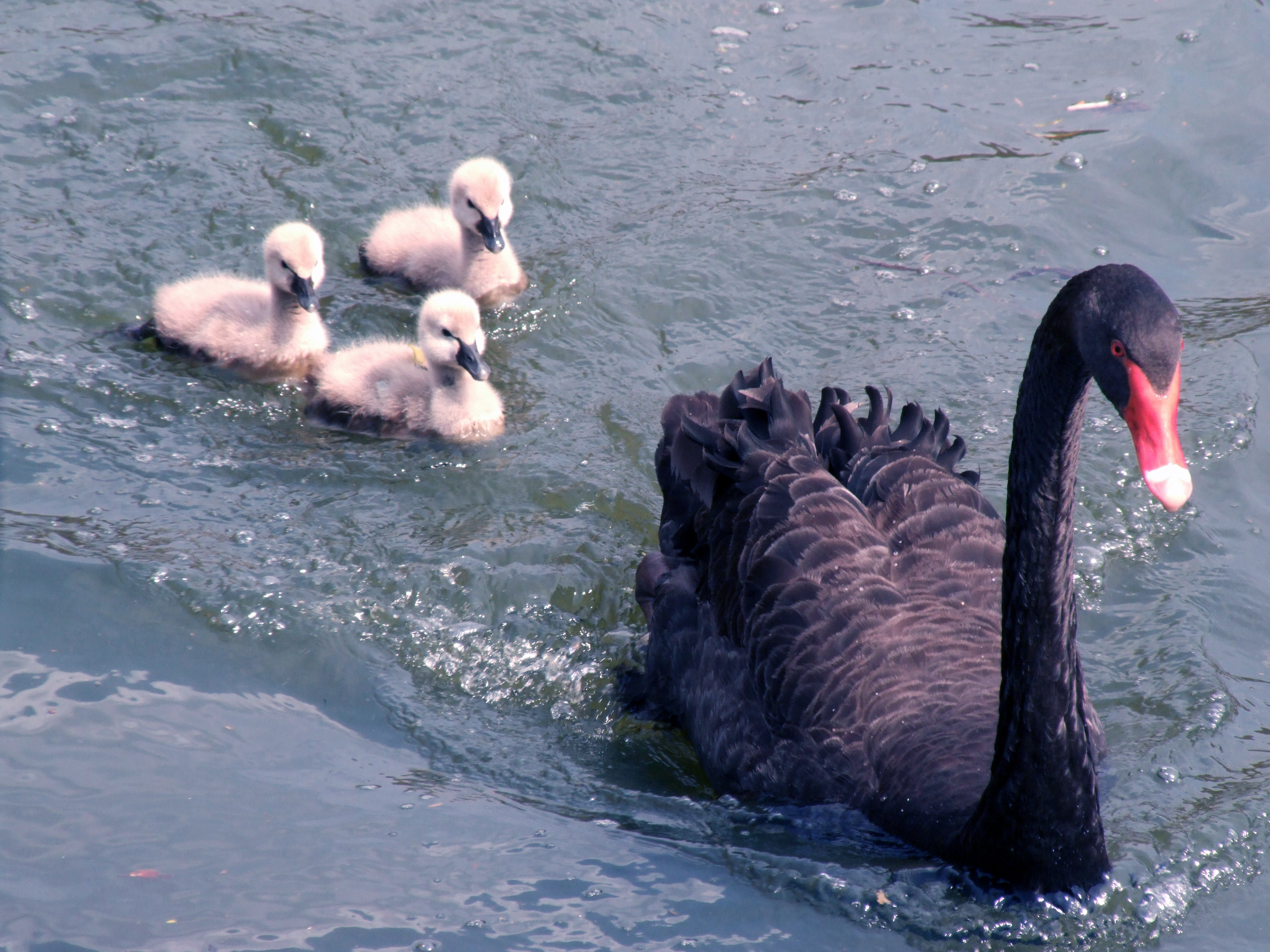 First mother swan swimming lesson for newborns 2006 Ibirapuera Park